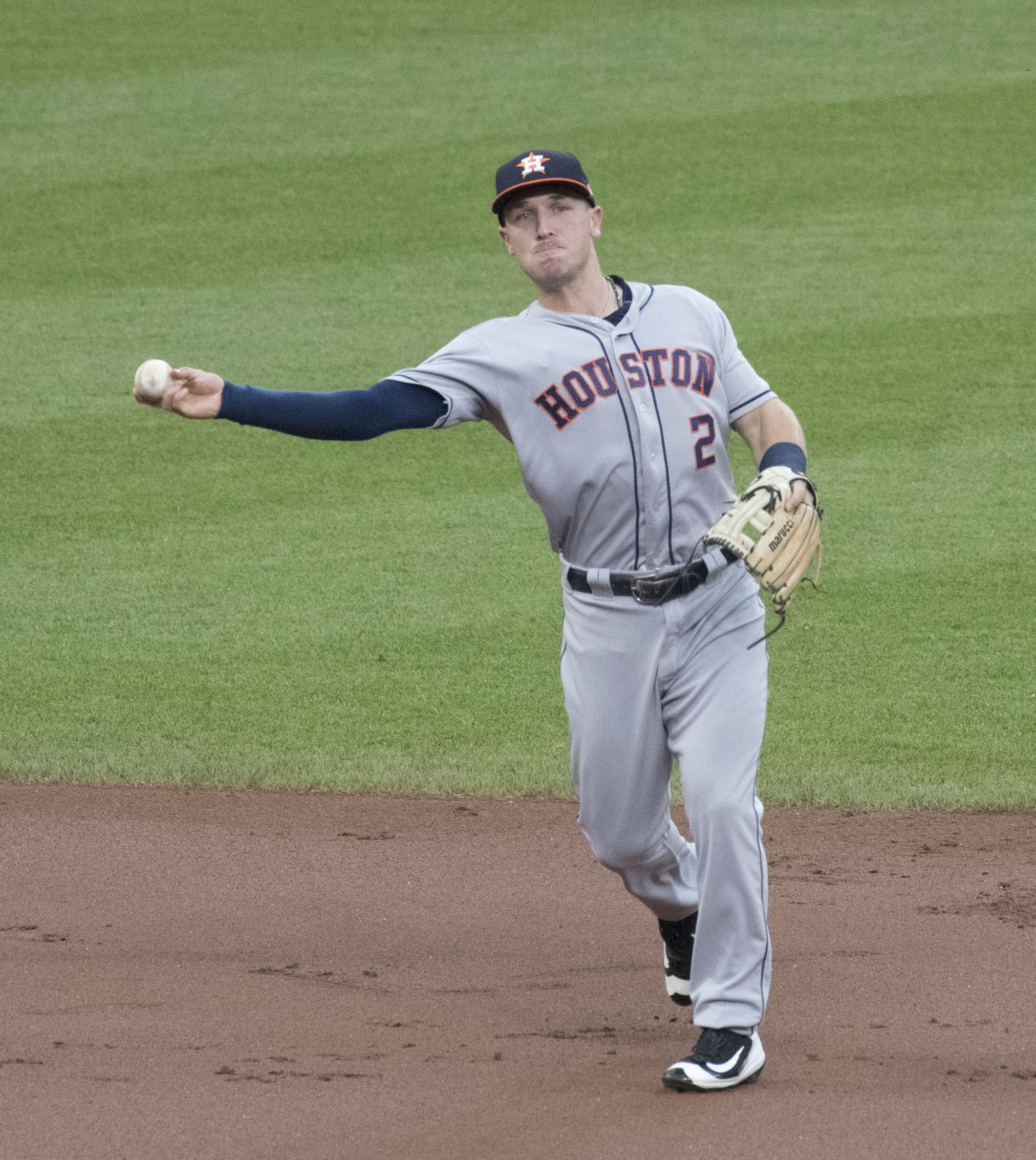 Astros at Orioles 7/21/17